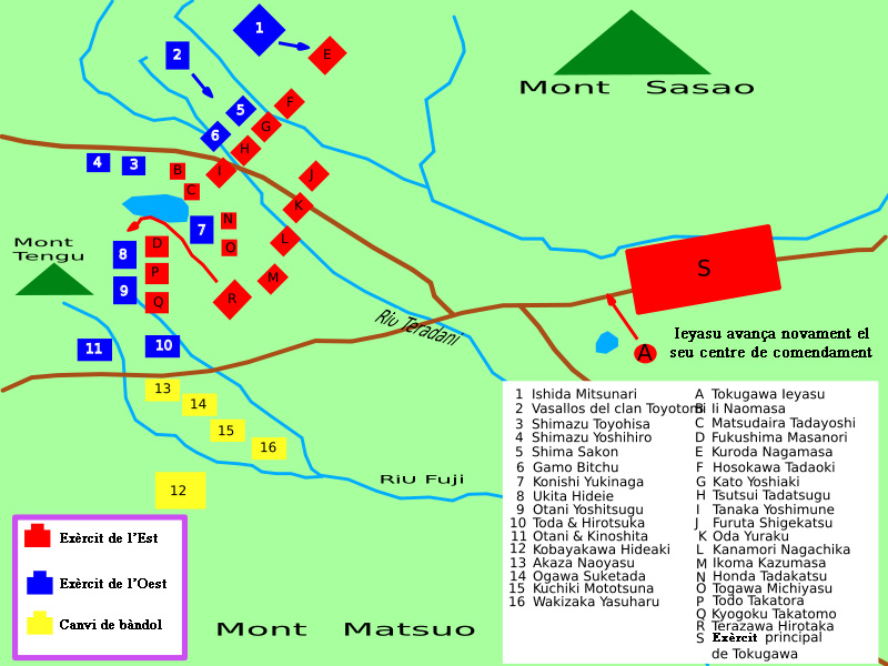 posició estratègica de les tropes durant la batalla